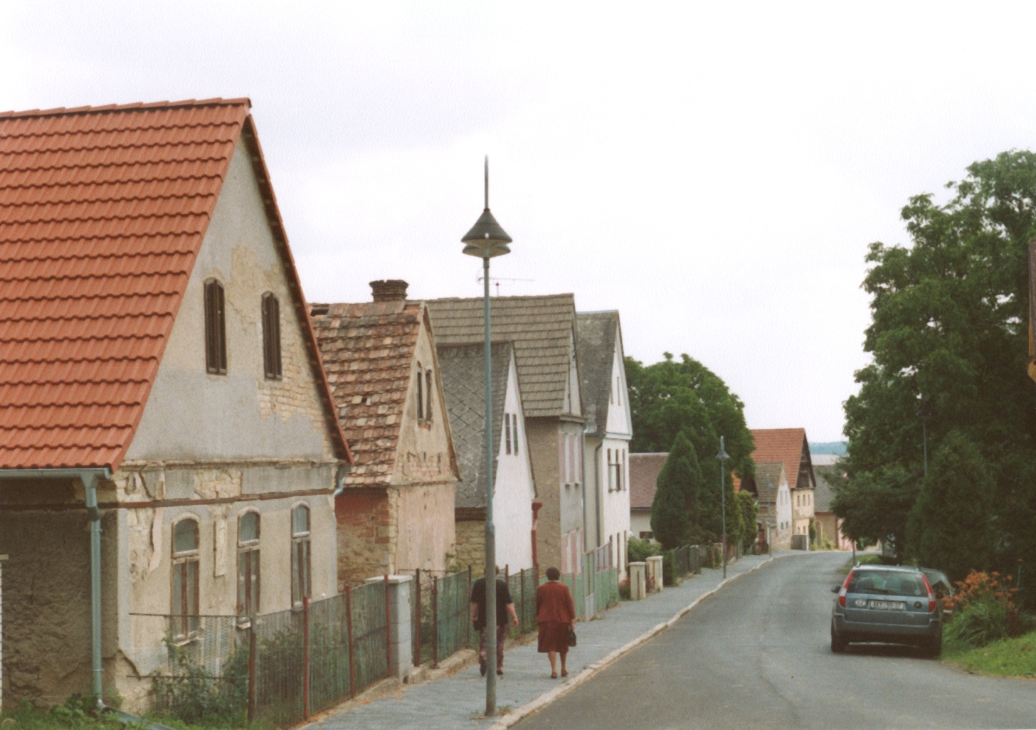 Chotiněves, Ústí nad Labem Region, Czech republic